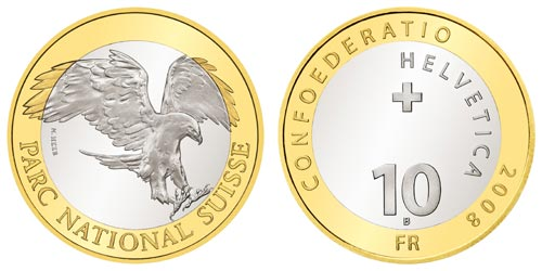 10 Fr commémorative de 2008, image originale de SwissMint